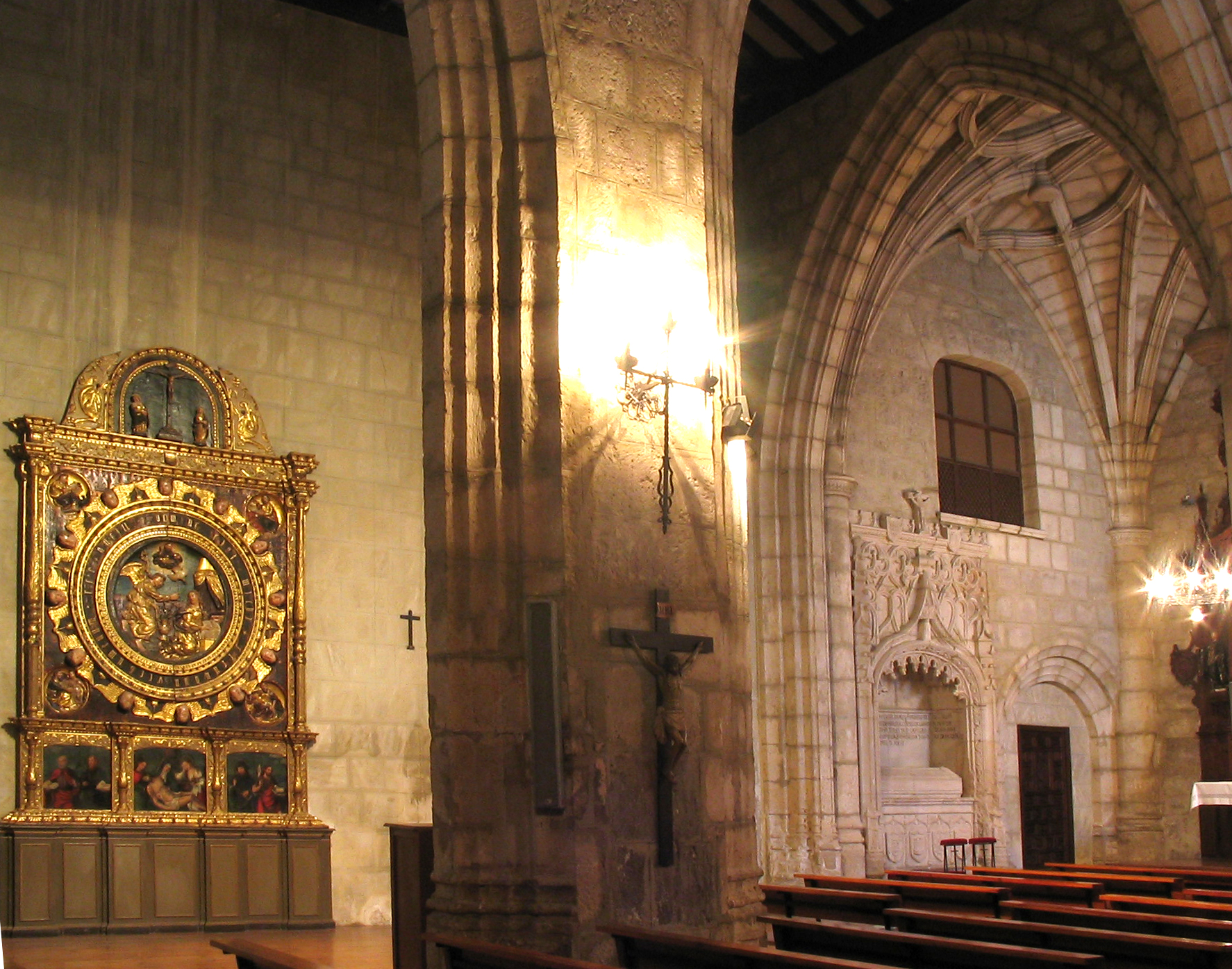 Interior del antiguo hospital de Santiago con el retablo berruguetesco y lucillo sepulcral de D. Luis de Acuña